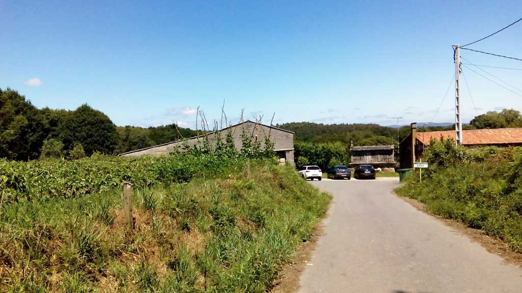 Vista da Insua, Curtis.